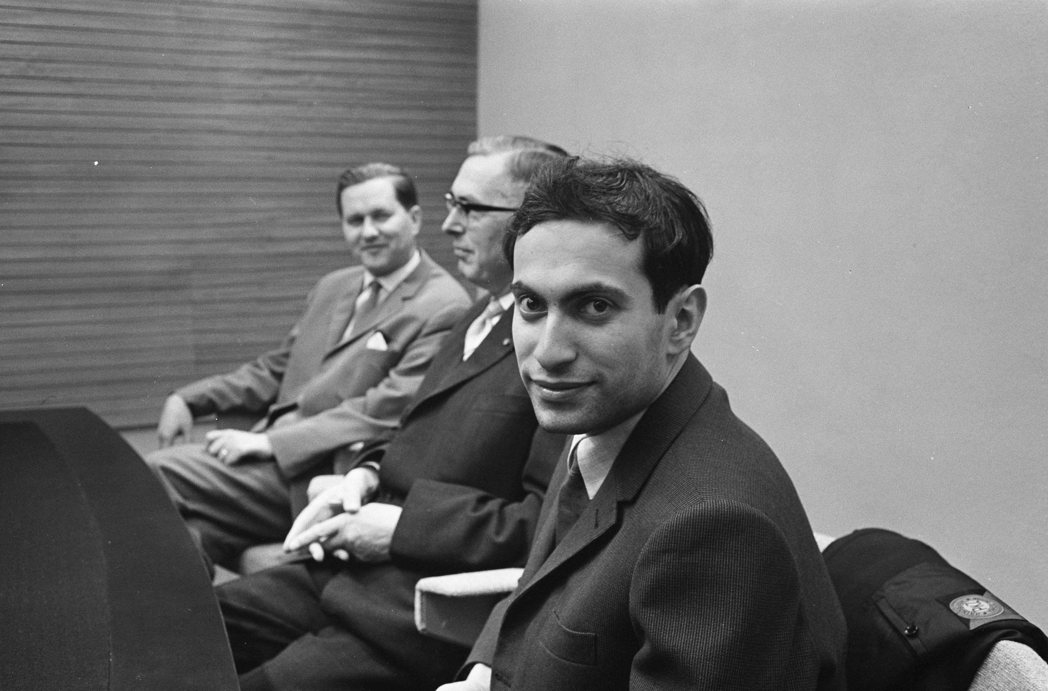 Collectie / Archief : Fotocollectie Anefo Reportage / Serie : [ onbekend ] Beschrijving : Acht Russische schaakmeesters op Schiphol R. Keres Dr. Max Euwe en wereldkampioen Tal Datum : 26 april 1962 Locatie : Noord-Holland, Schiphol Trefwoorden : schaakmeesters, schaken, wereldkampioenen Persoonsnaam : Dr. Max Euwe, Keres, R. Fotograaf : Pot, Harry / Anefo Auteursrechthebbende : Nationaal Archief Materiaalsoort : Negatief (zwart/wit) Nummer archiefinventaris : bekijk toegang 2.24.01.05 Bestanddeelnummer : 913-8136